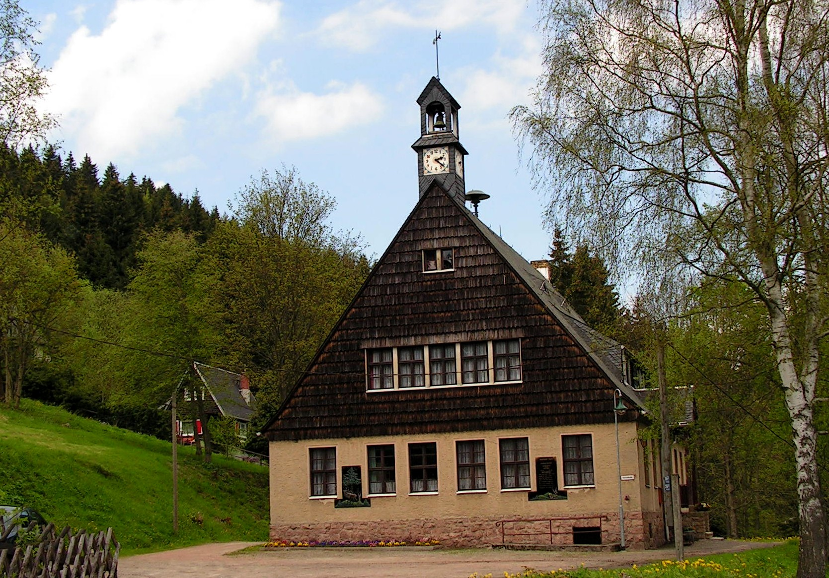 Ehemalige Grenzland-Schule und heutiges Haus des Gastes „Saafnlob-Haus“ Wildenthal